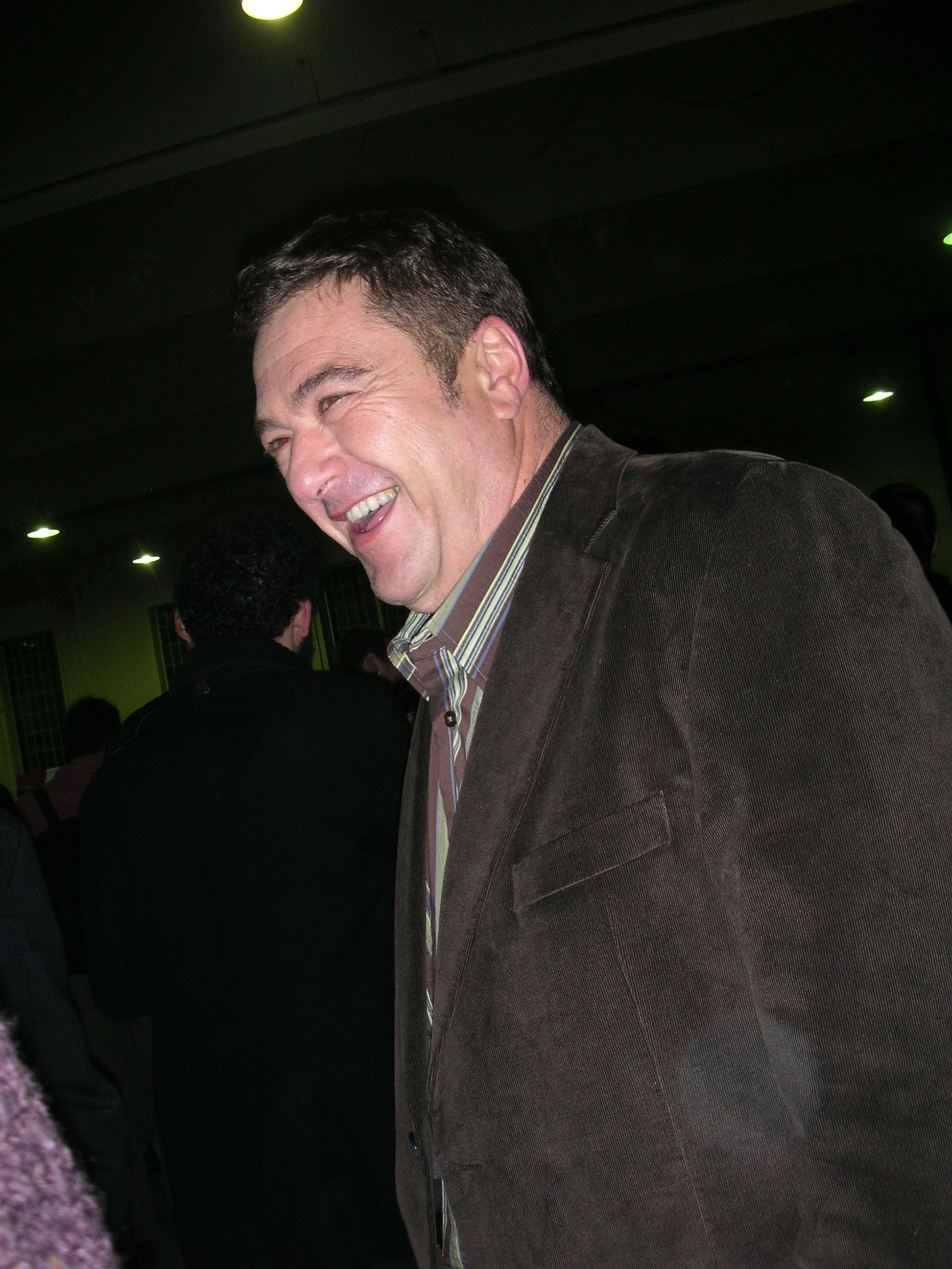 Hasier Etxeberria idazlea, kazetaria, blogaria, eta aurkezlea.